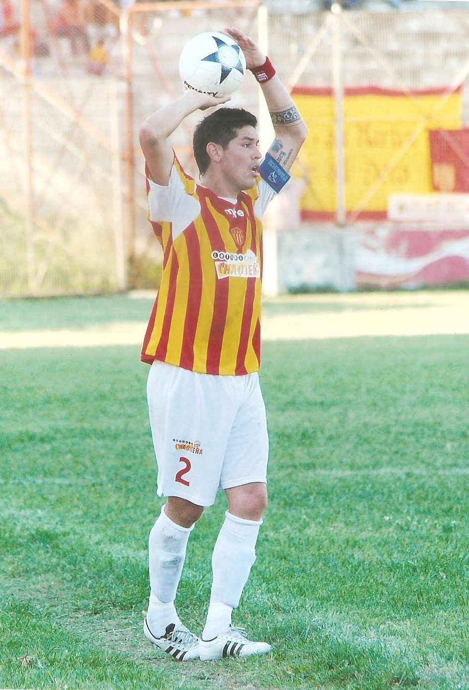 Paulo Centurión del Club Atlético Sarmiento (Resistencia) en una acción en el encuentro disputado en la Provincia de Formosa contra el Club Sportivo General San Martín de dicha ciudad